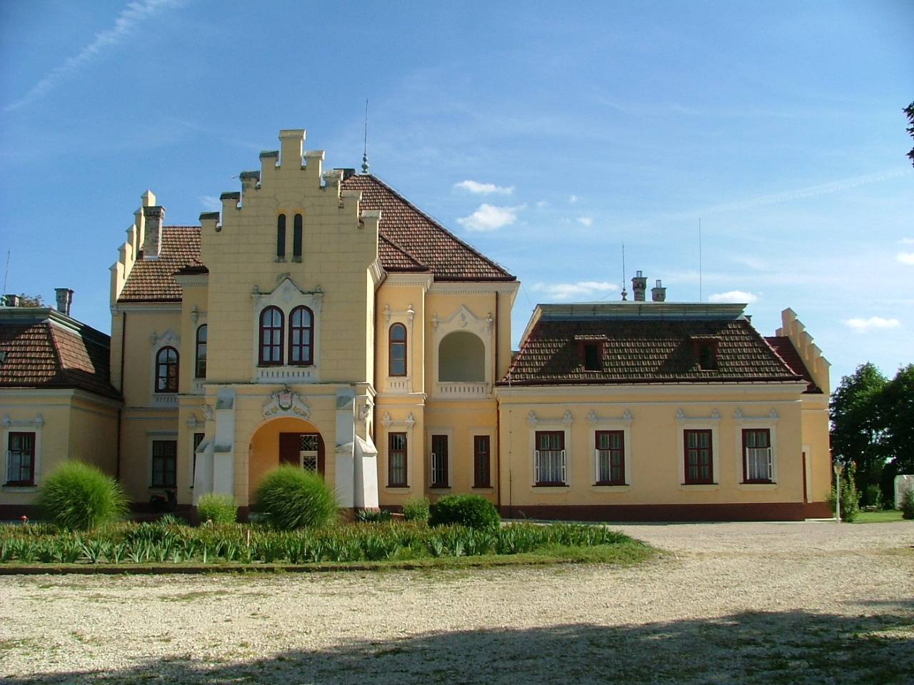 Téti Pokváry-kastély homlokzata